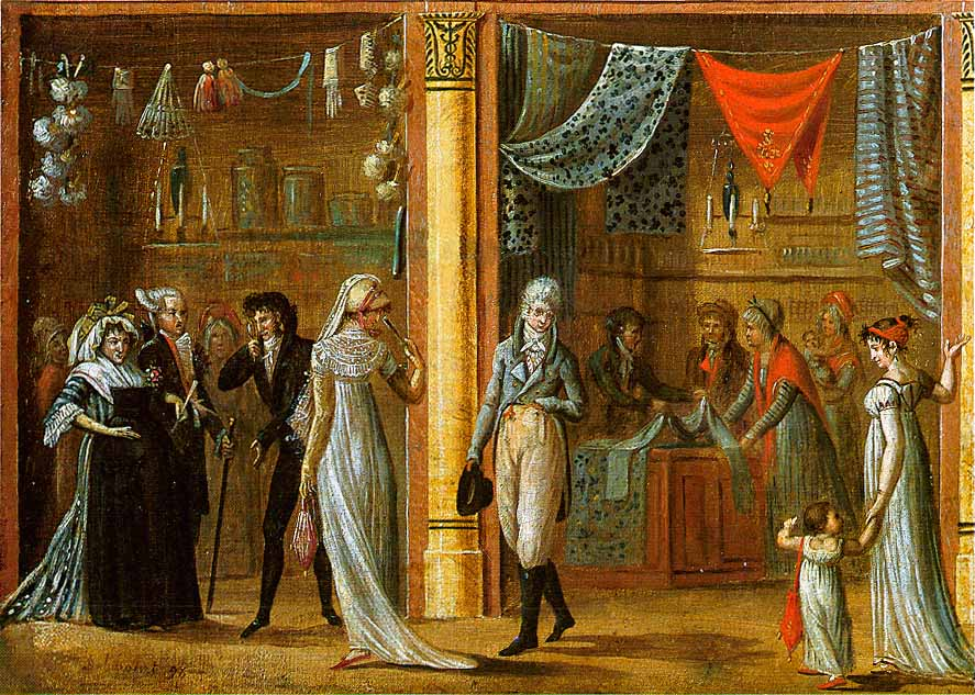 "Promenade de la galerie du Palais-Royal" by Philibert-Louis Debucourt (1755-1832). Aquatint.